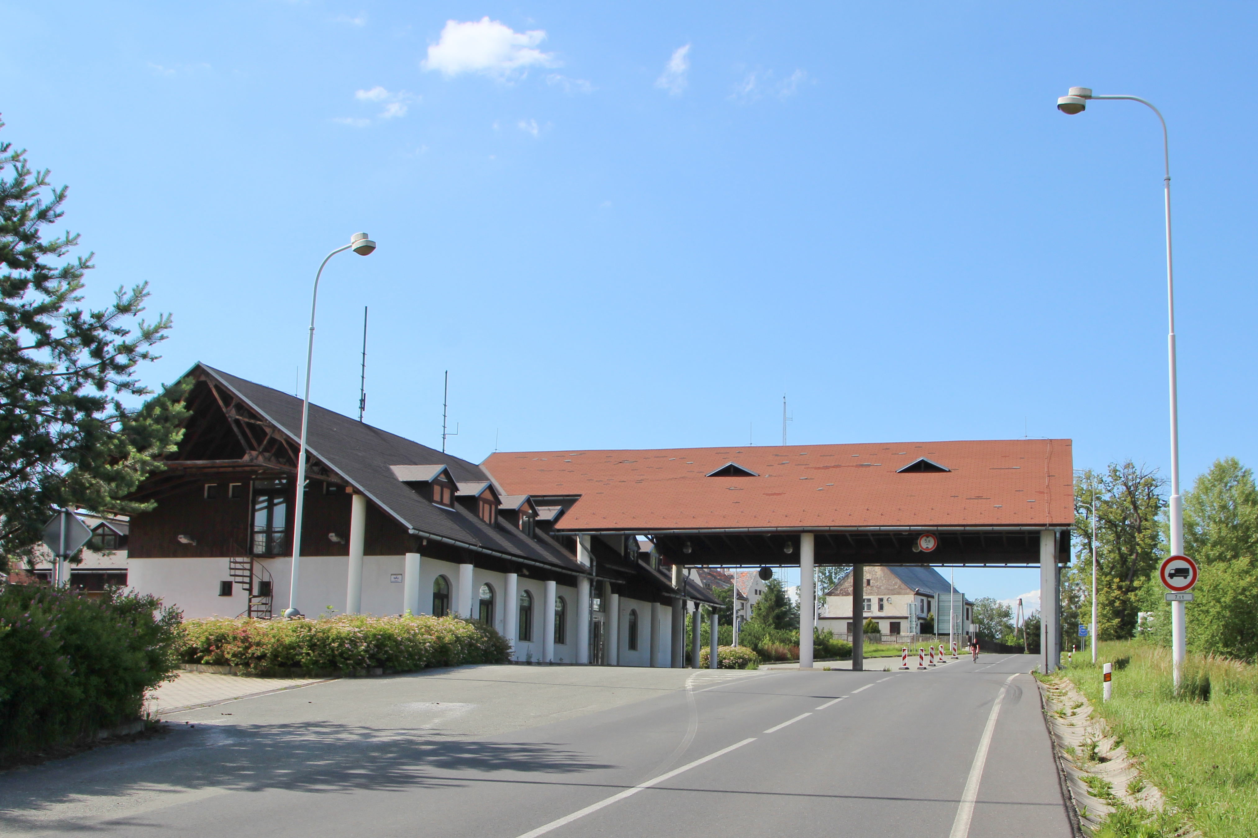 Przejście graniczne Konradów-Zlaté Hory – polsko-czeskie drogowe przejście graniczne położone w województwie opolskim, w powiecie nyskim, w gminie Głuchołazy.